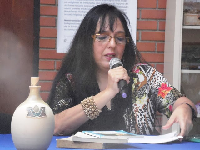 Wafi Salih, en una conferencia sobre identidad mítica venezolana, en el estado Yaracuy.